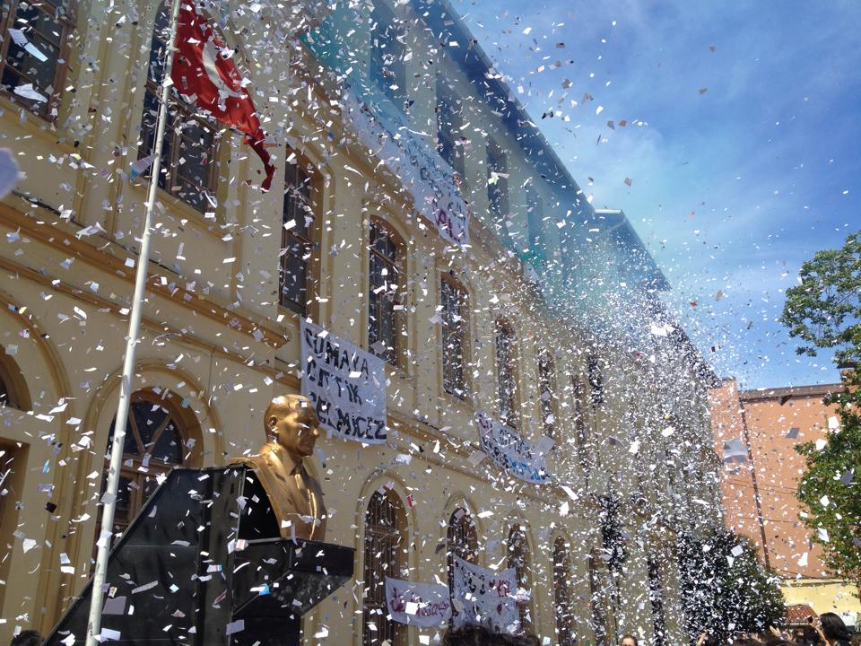 156. Dönemin Konfeti Günü'nden